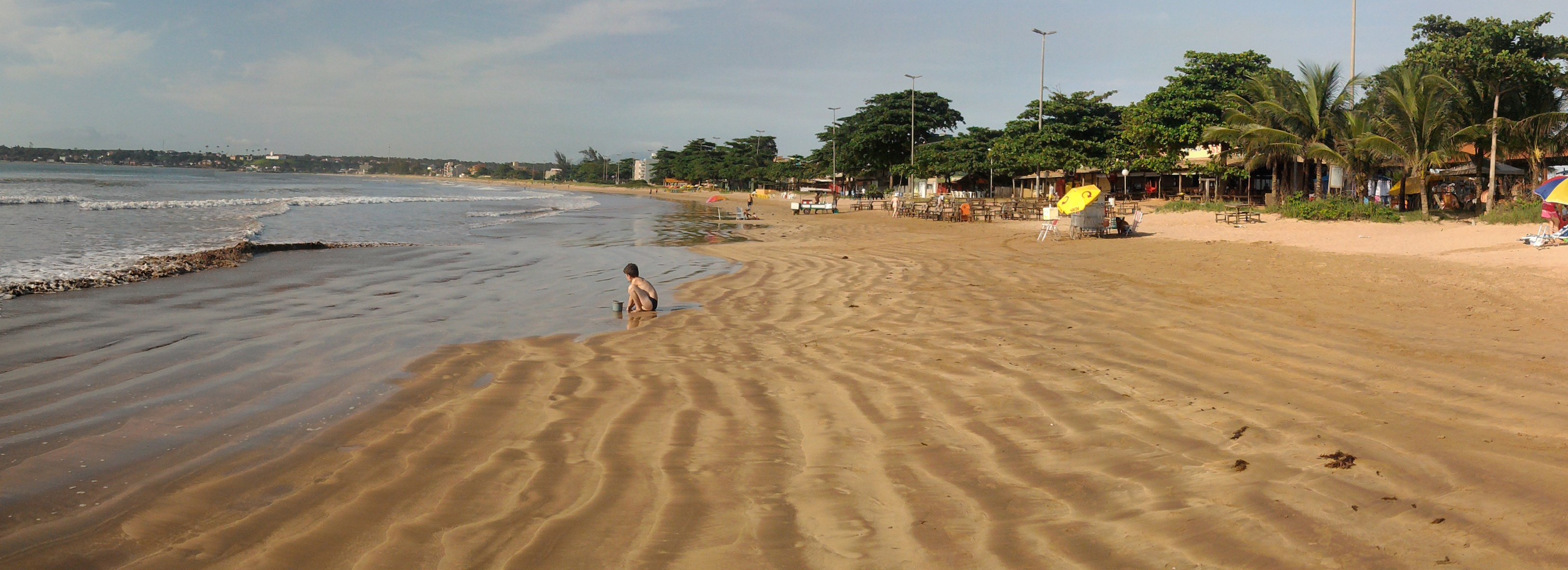 Vista do litoral de Praia Grande, em Fundão, Espírito Santo, próximo ao Boteco do Chico.